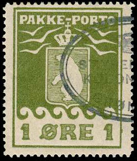 Посылочная марка Гренландии